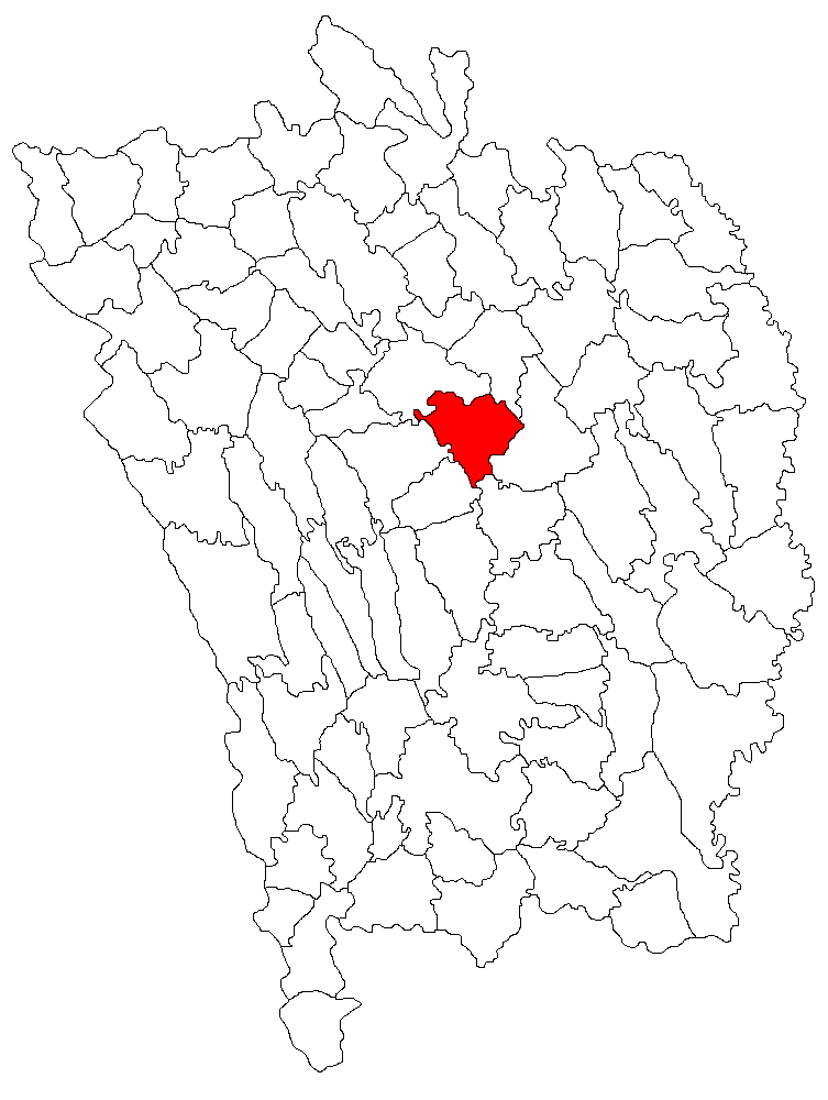 Categorie:Hărţi ale judeţului Vaslui